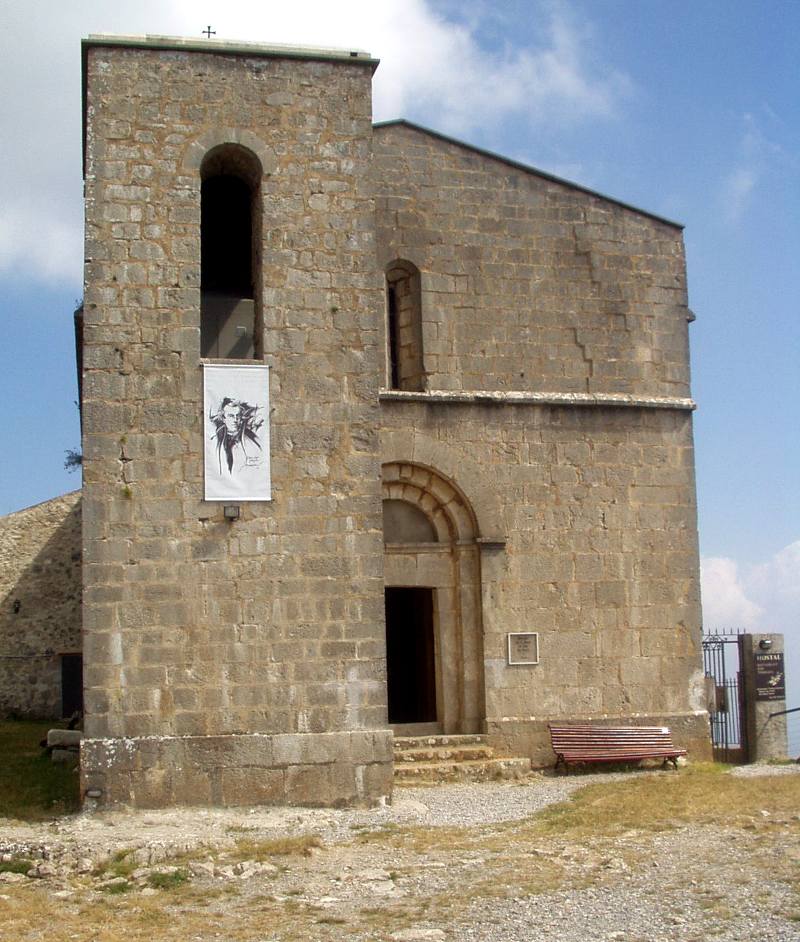 Santuari Mare de Déu del Mont